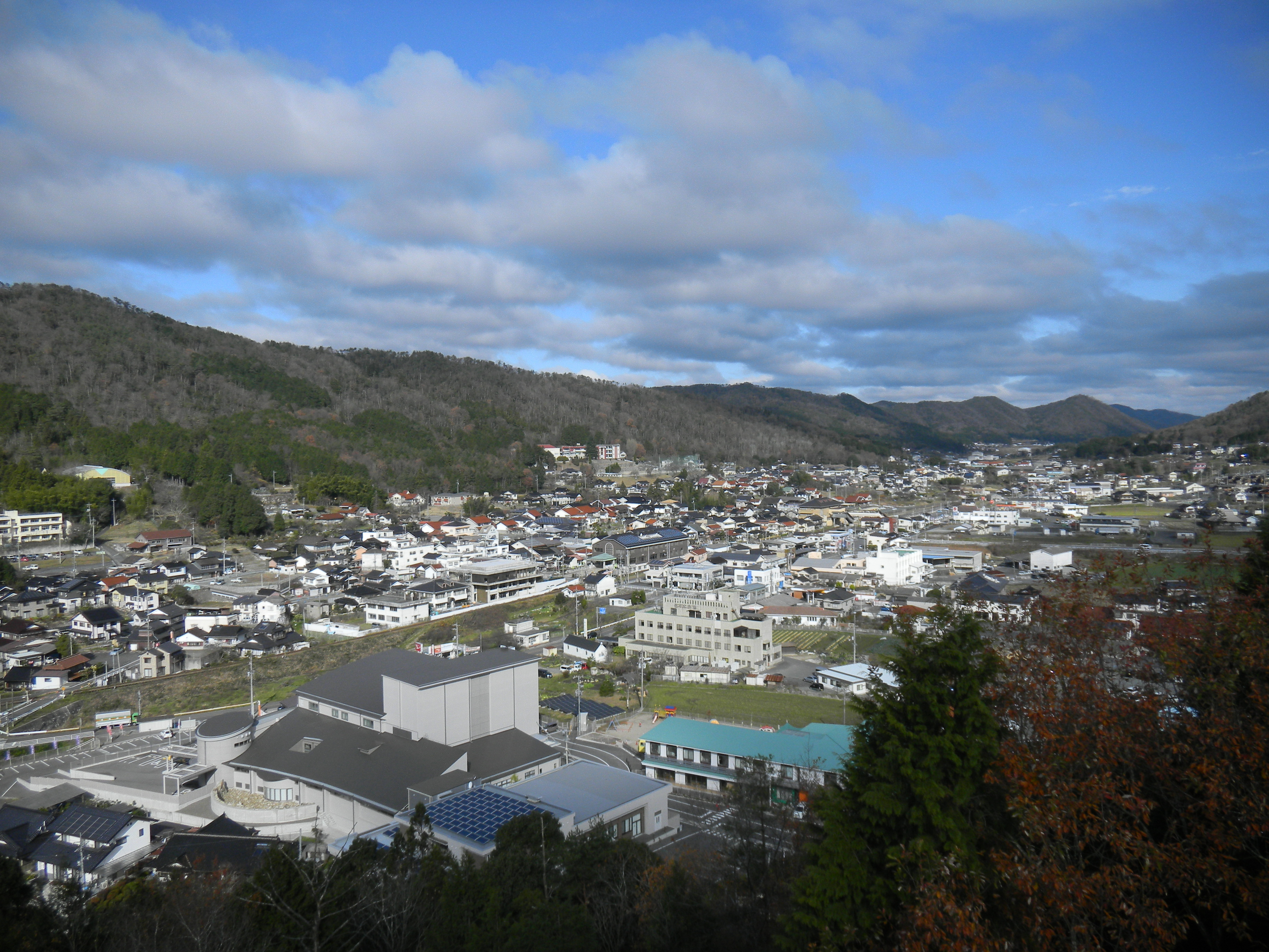 向原町（広島県）